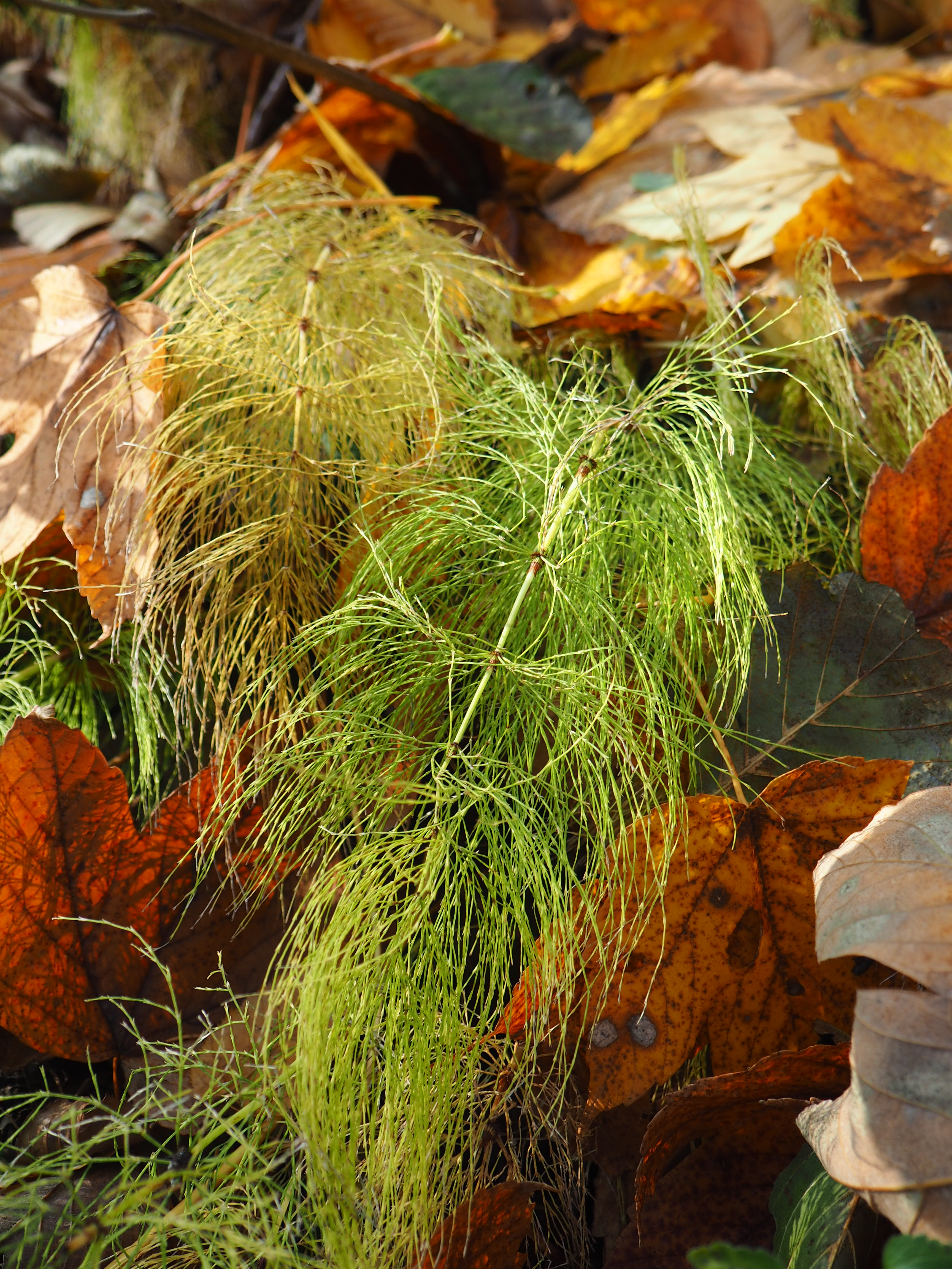 Přeslička lesní, vyfocena na břehu rybníka Švýcar